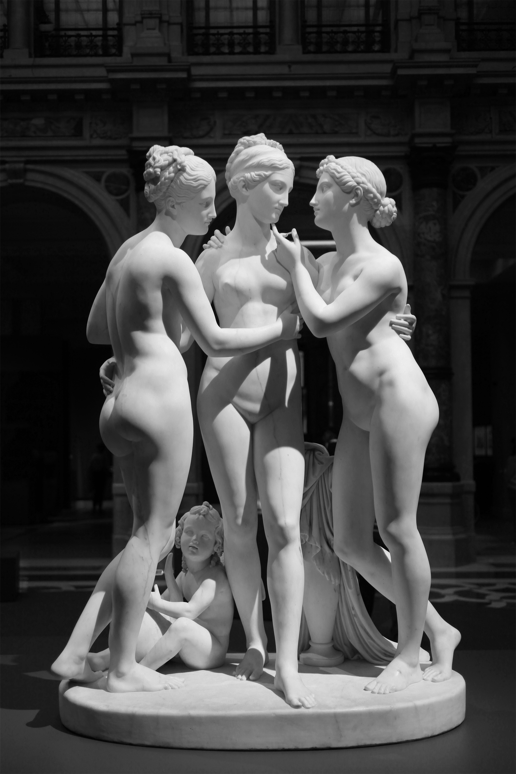 Bertel Thorvaldsen (1770-1844) Le Grazie con Cupido (1820-1823) dal modello in gesso del 1817-1819. Copenhagen, Thorvaldsen's Museum. Fotografata alla mostra "Canova-Thorwaldsen" presso le Galleria di Italia di Milano.